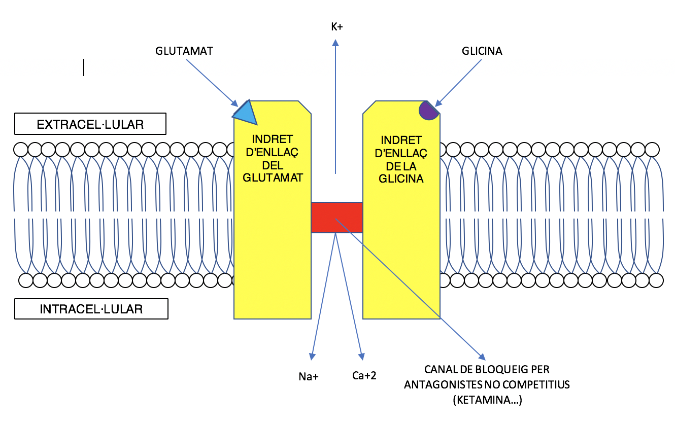 Ketamina impidiendo el paso de iones y causando una disfunción neuronal